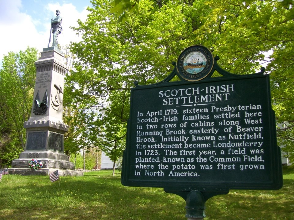 Plaque commémorative arrivée patates à Derry